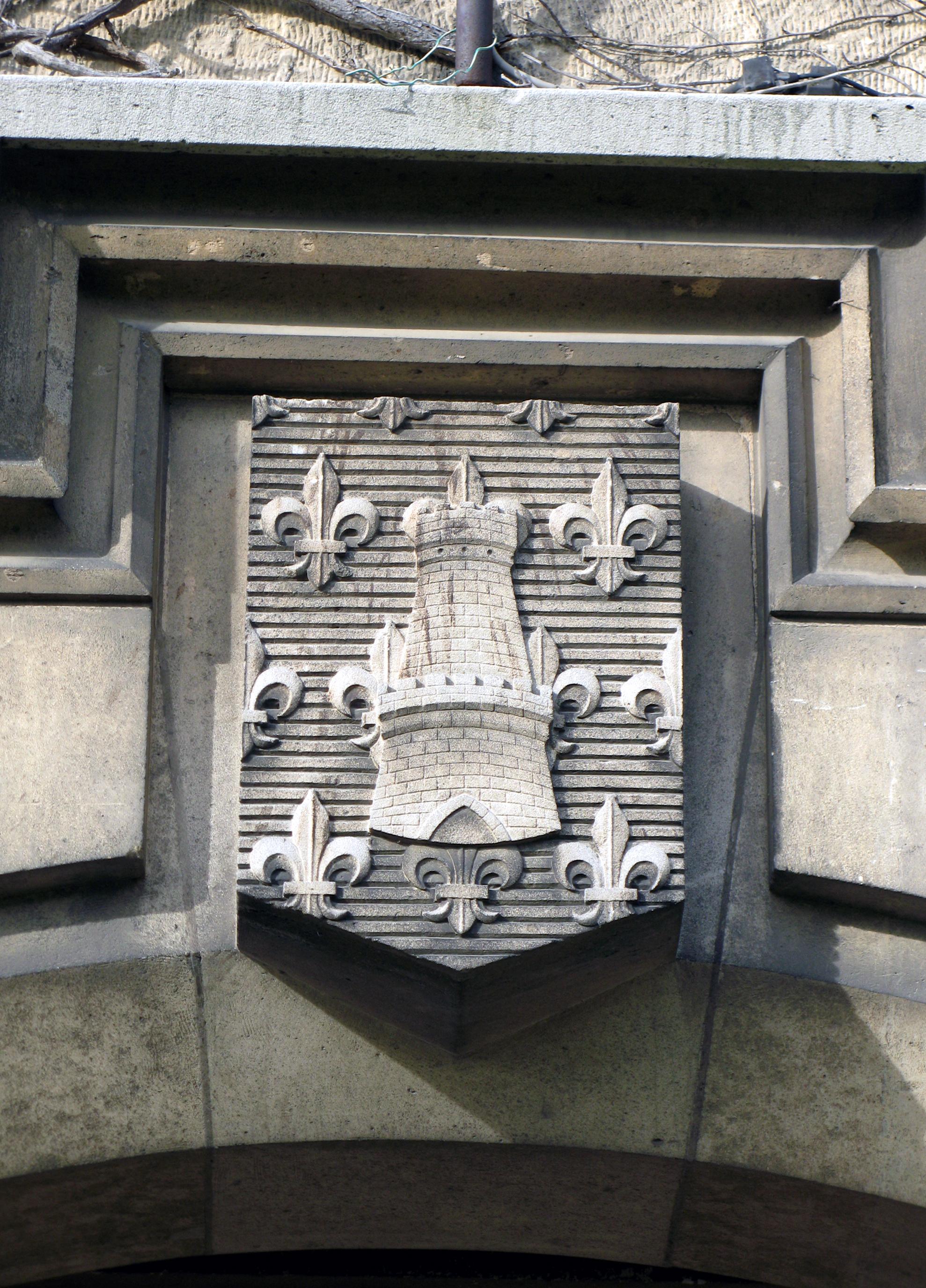 Montdidier (Somme, France) - Les armoiries de la ville, visibles sur la façade Sud du Prieuré et surmontant le passage de la Rue Saint-Pierre à travers le bâtiment. . .